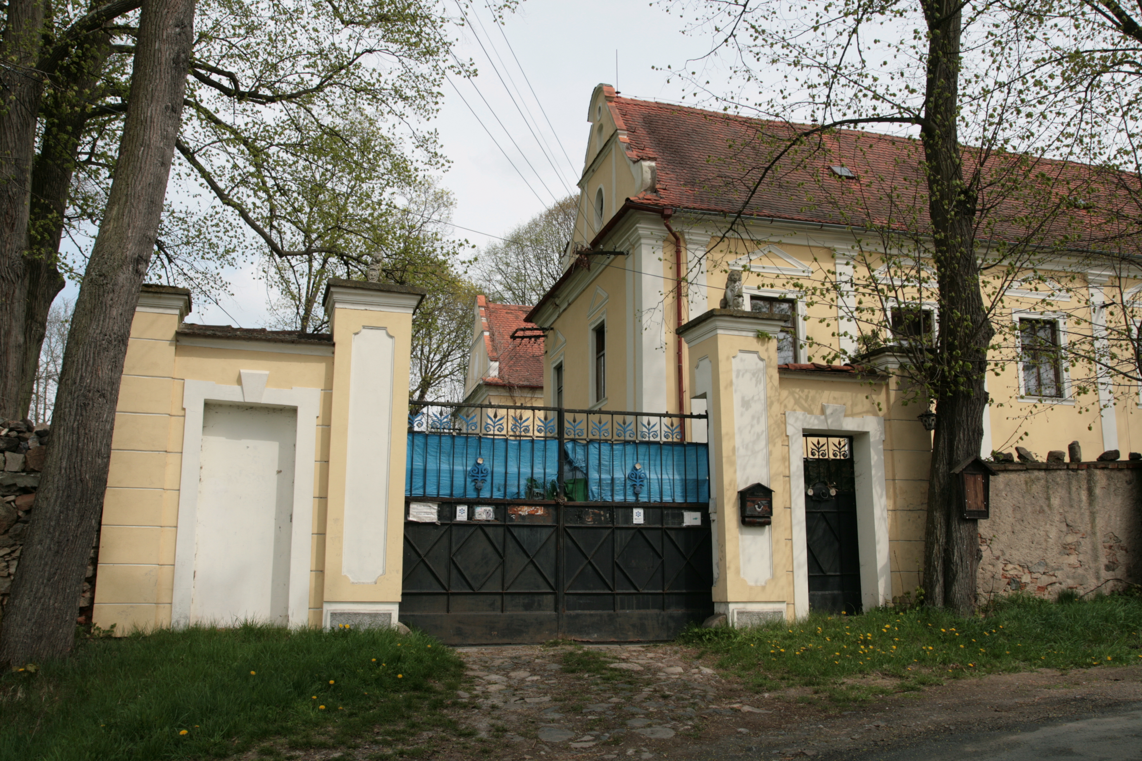 Vesnice Otín, část města Klatovy. Zámek s oborou.